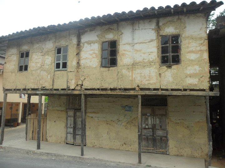 Casa construida con bahareque y adobe en el centro parroquial